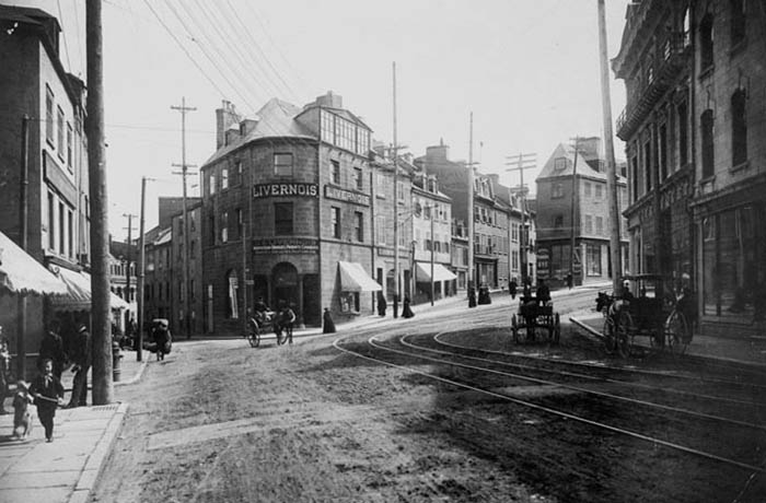 Le studio du photographe Livernois sur la rue Saint-Jean, vers 1890 à Québec (Québec) Canada. Photographie attribuée à William James Topley. Pièce faisant partie de collection Andrew Merrilees, Bibliothèque et Archives Canada.